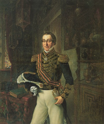 Andreas van den Bogaerde van Terbrugge